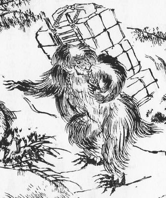 Ijū (異獣) from Hokuetsu Seppu (北越雪譜)